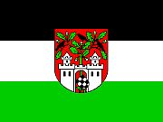 Stadtfahne Aschersleben